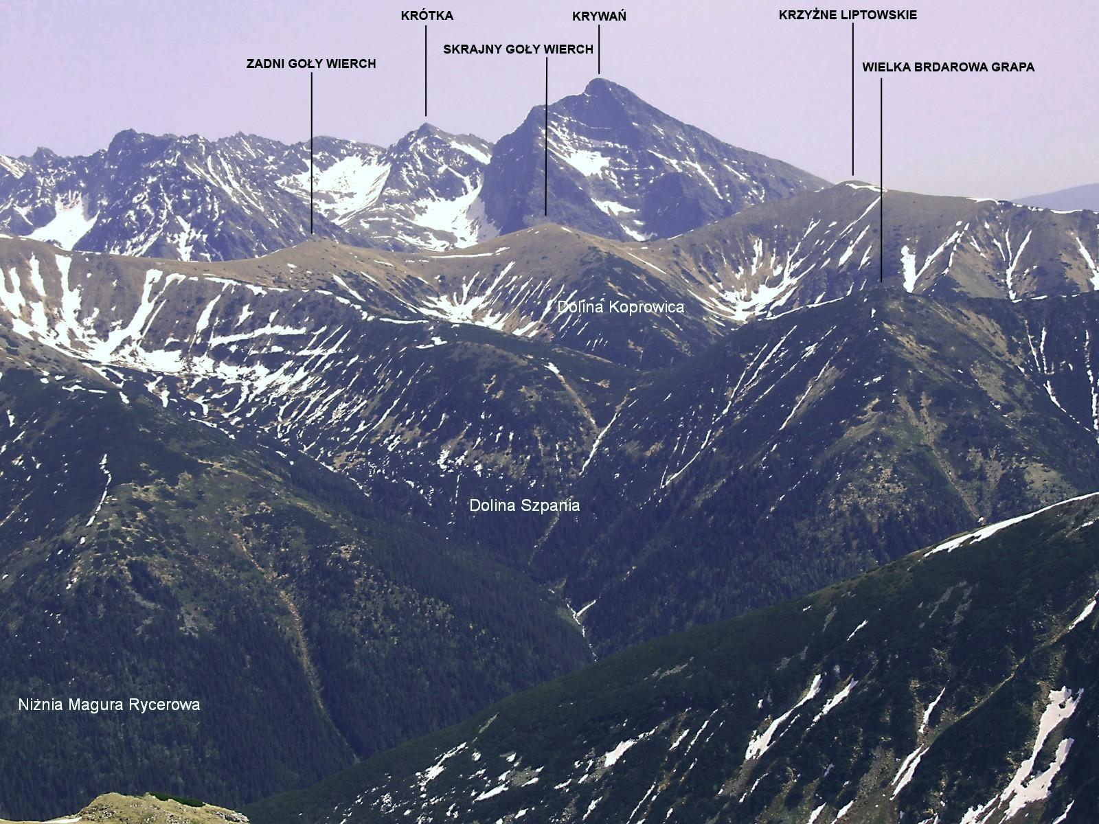 Jerzy Opioła